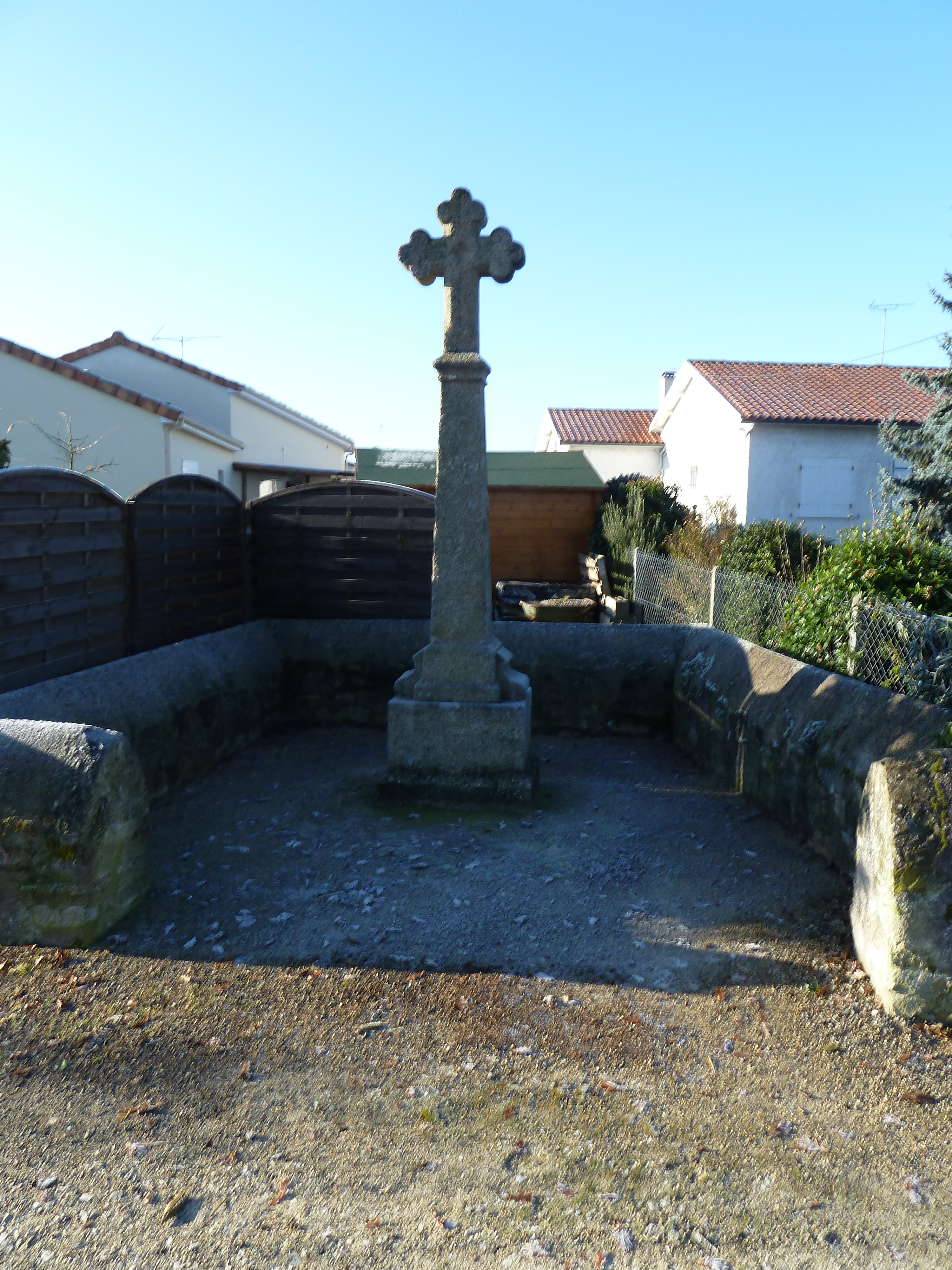 calvaire ancien